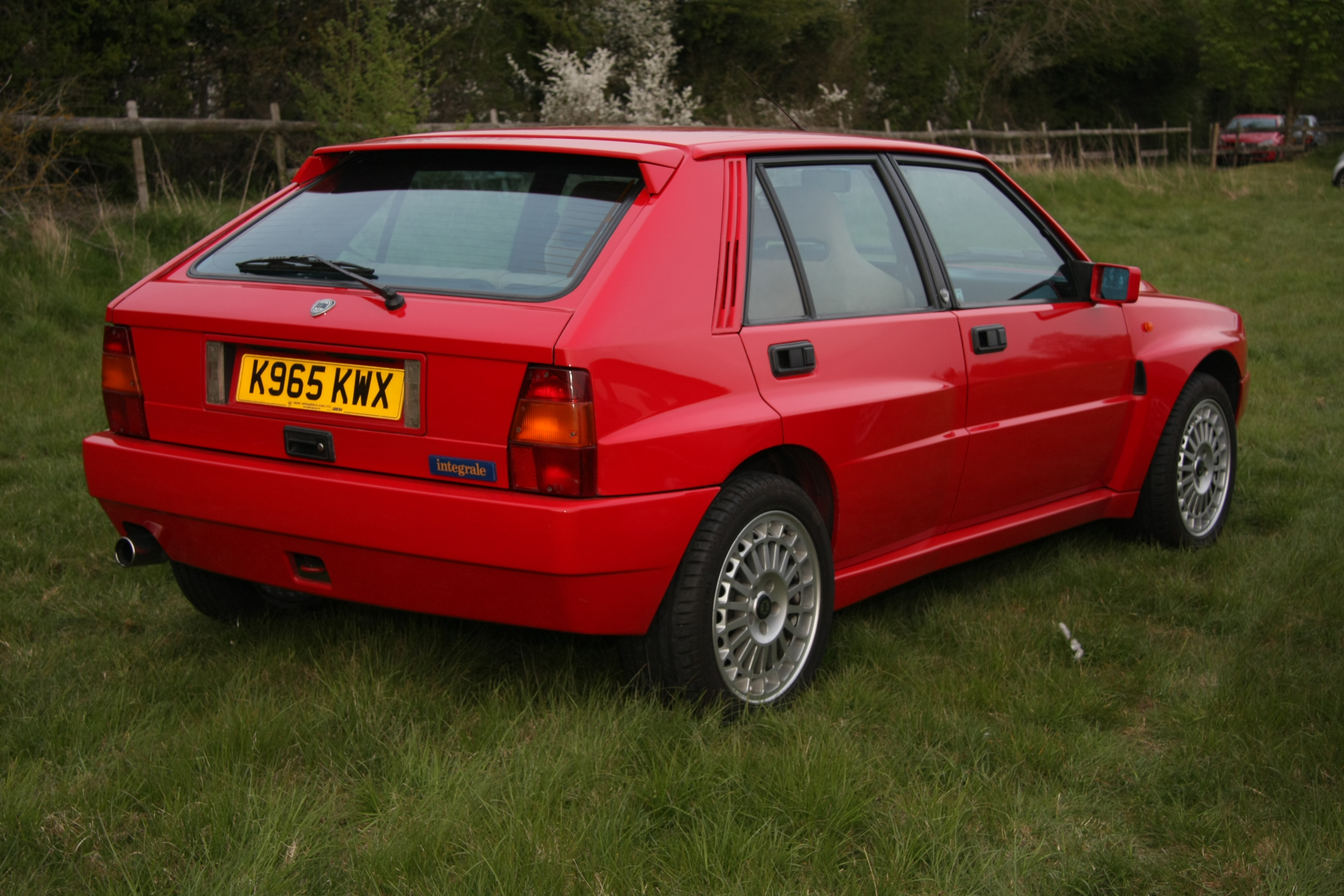 Lancia Delta HF Integrale "Evoluzione 2" at Bristol Italian Car Day 2010